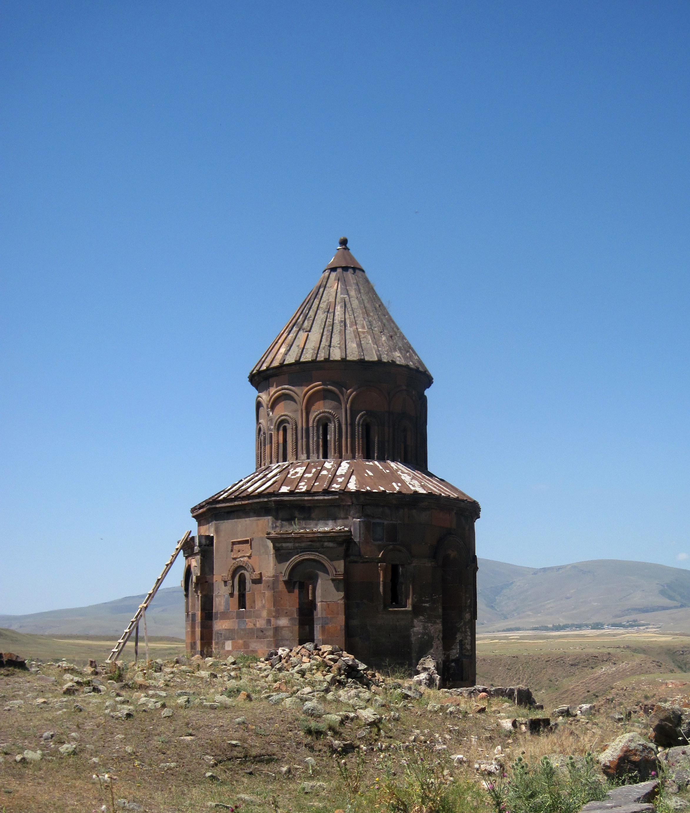 L'église Saint-Grégoire d'Abougraments est une ancienne église située dans les ruines de l'ancienne capitale arménienne d'Ani, en Turquie.